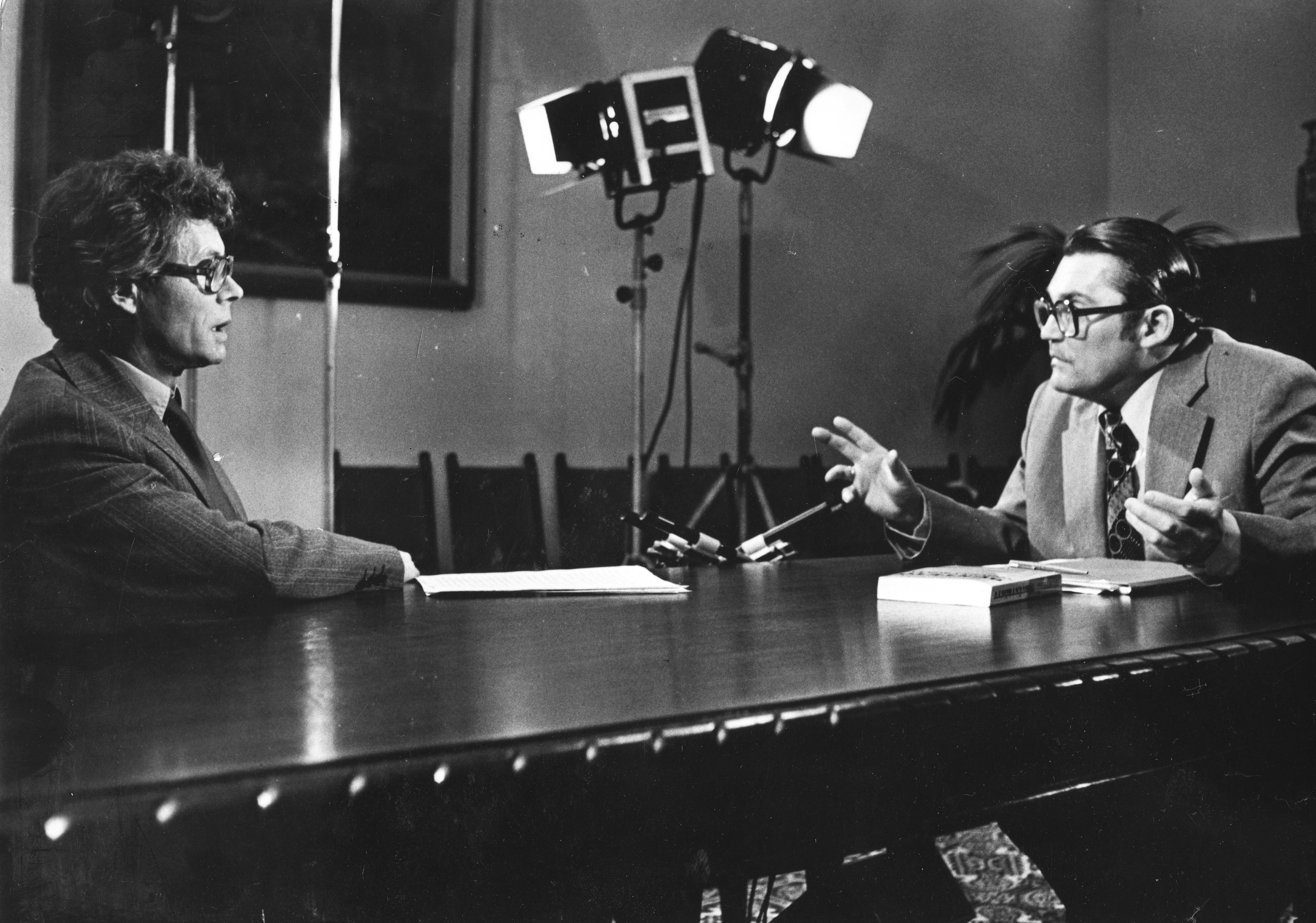 Bán János riporter és Markója Imre igazságügyi miniszter. Location: Hungary, Budapest Tags: reporter Title: Bán János riporter és Markója Imre igazságügyi miniszter.